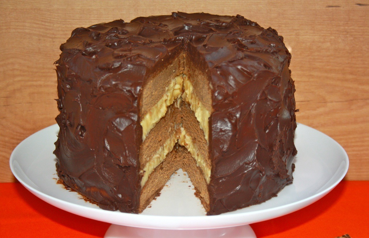 Bizcocho de chocolate y nata